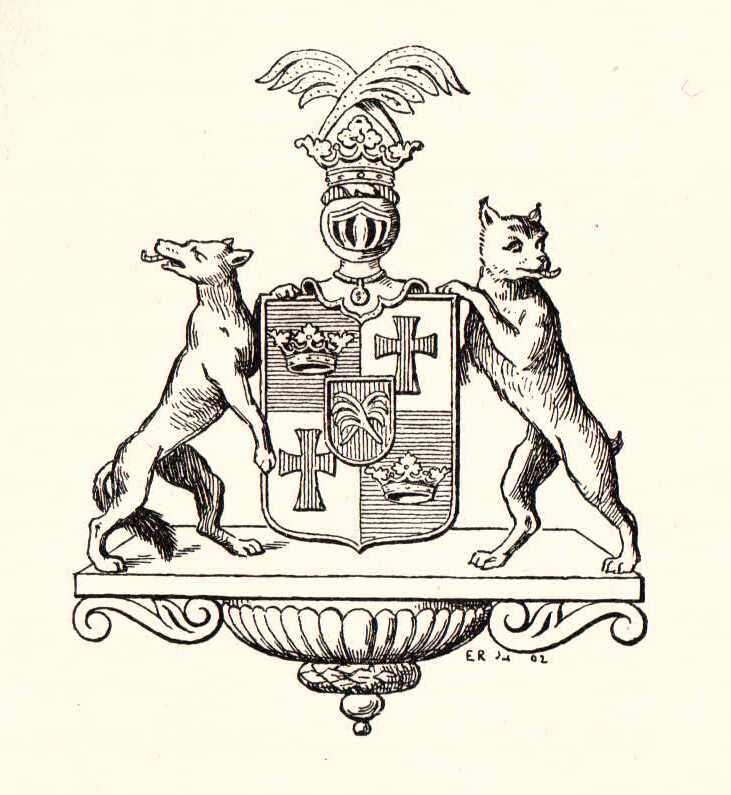 Adelsvåben godkendt i adelspatent til stiftamtmand Hans Hagerup (Gyldenpalm) 23. februar 1781.